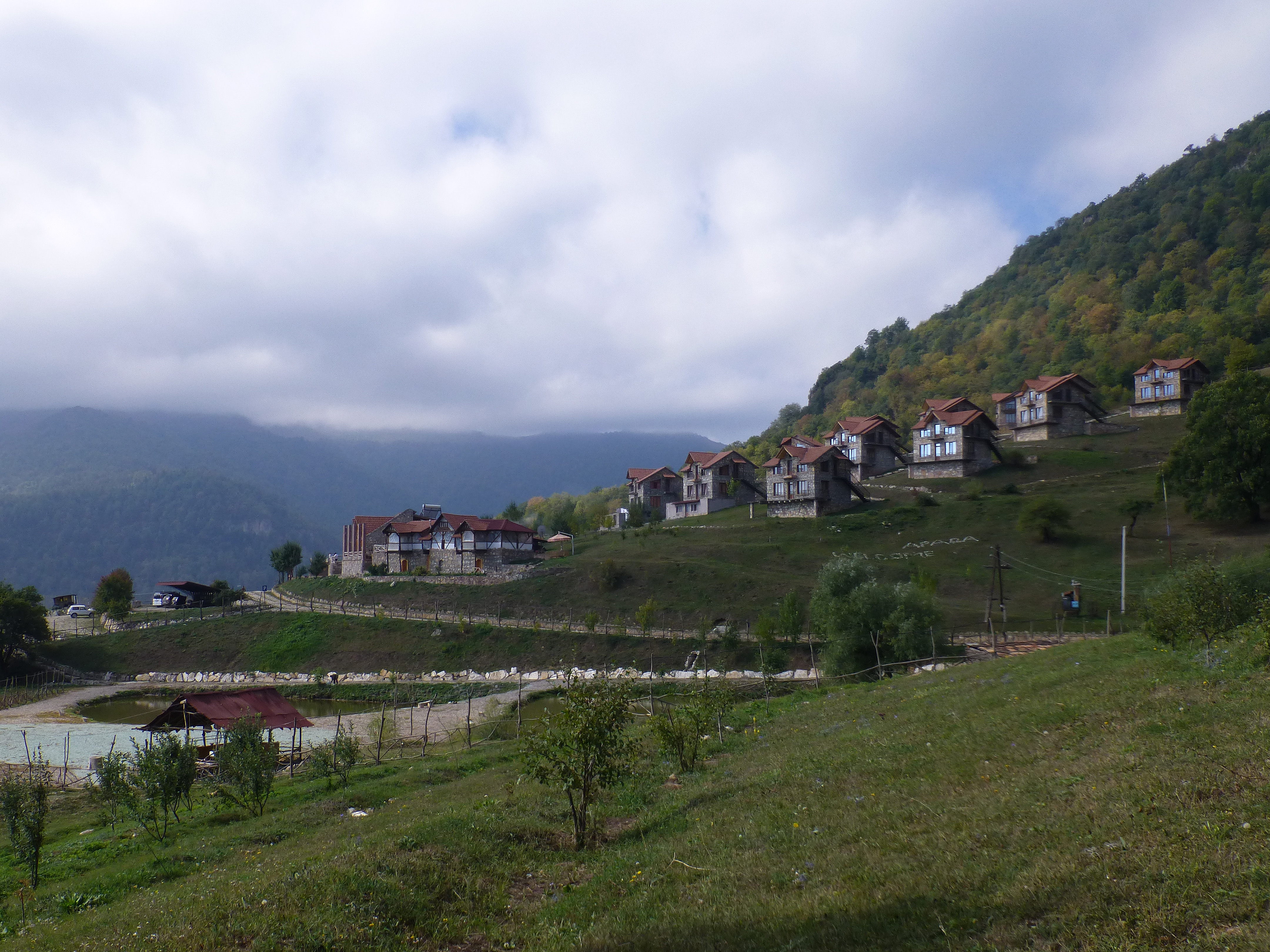 Cottages de vacances datant de l'ère soviétique à Yenokavan (Tavush, Arménie).